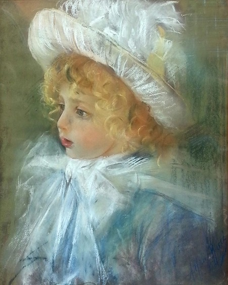 Fanciullo, pastello su carta, 33 x 46 cm., firmato, coll. privata